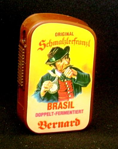 Schnupftabakdose der Firma "Bernard Tabak AG"